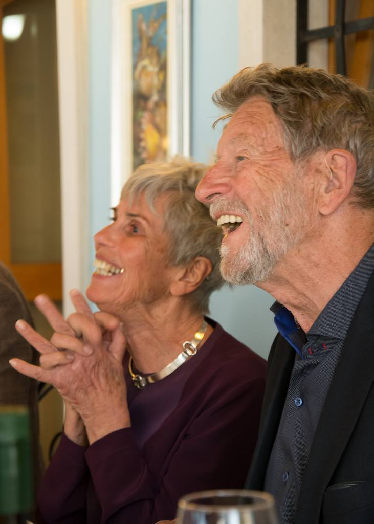 Michael und Gertraud Norz, 2016